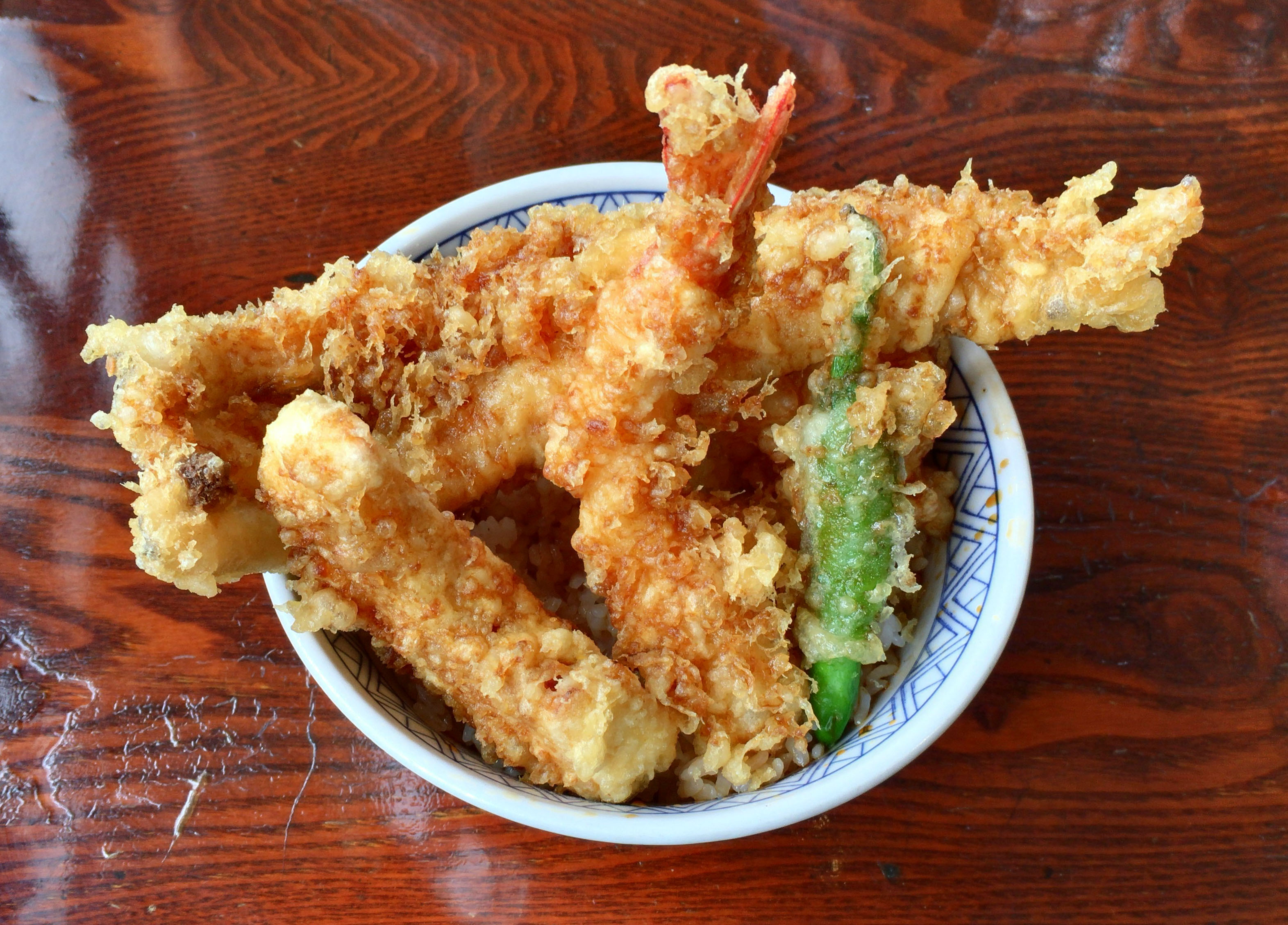 土手の伊勢屋 天丼（ロ）（2100円） アナゴの手前に左からカボチャ、海老、オクラ、下に隠れてイカの掻き揚げ